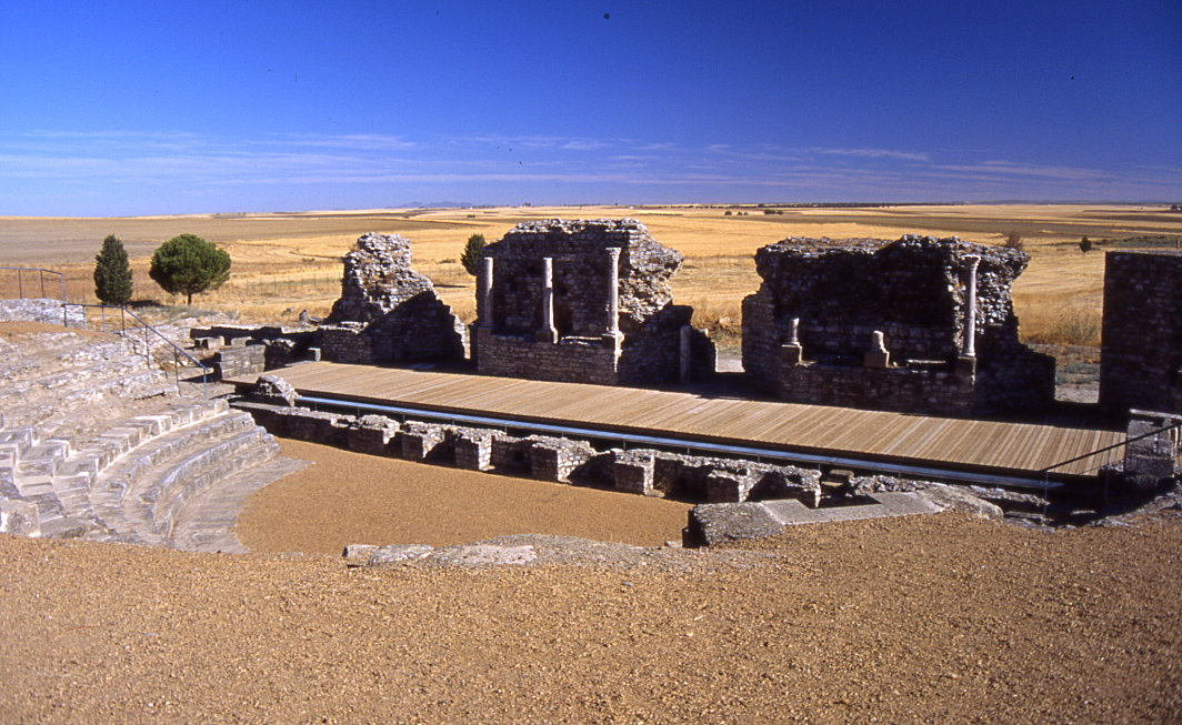 Teatro romano, Casas de Reina, provincia de Badajoz, Extremadura, España.